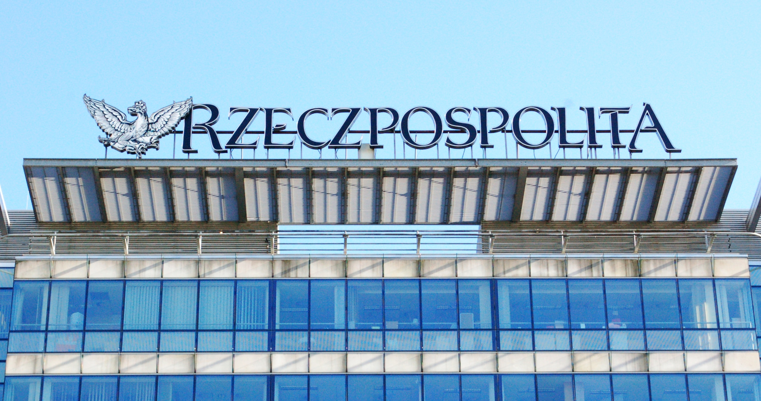 Prosta Str Warschau